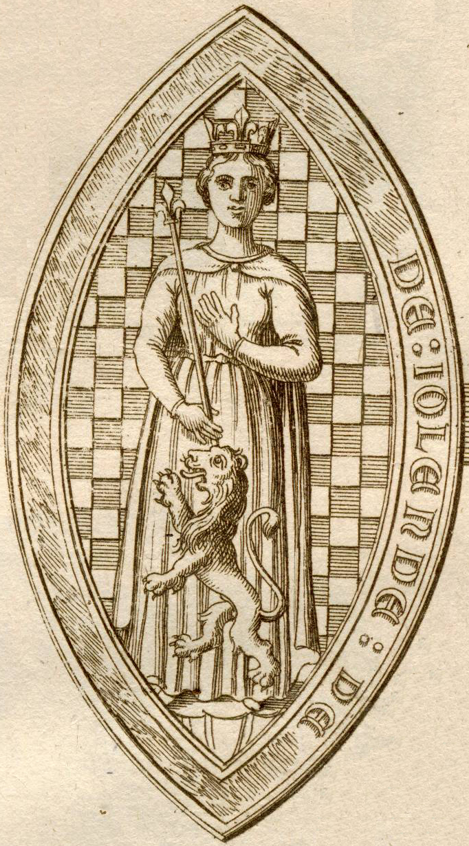 Sceau de Yolande d'Ecosse, comtesse de Montfort, Duchesse de Bretagne